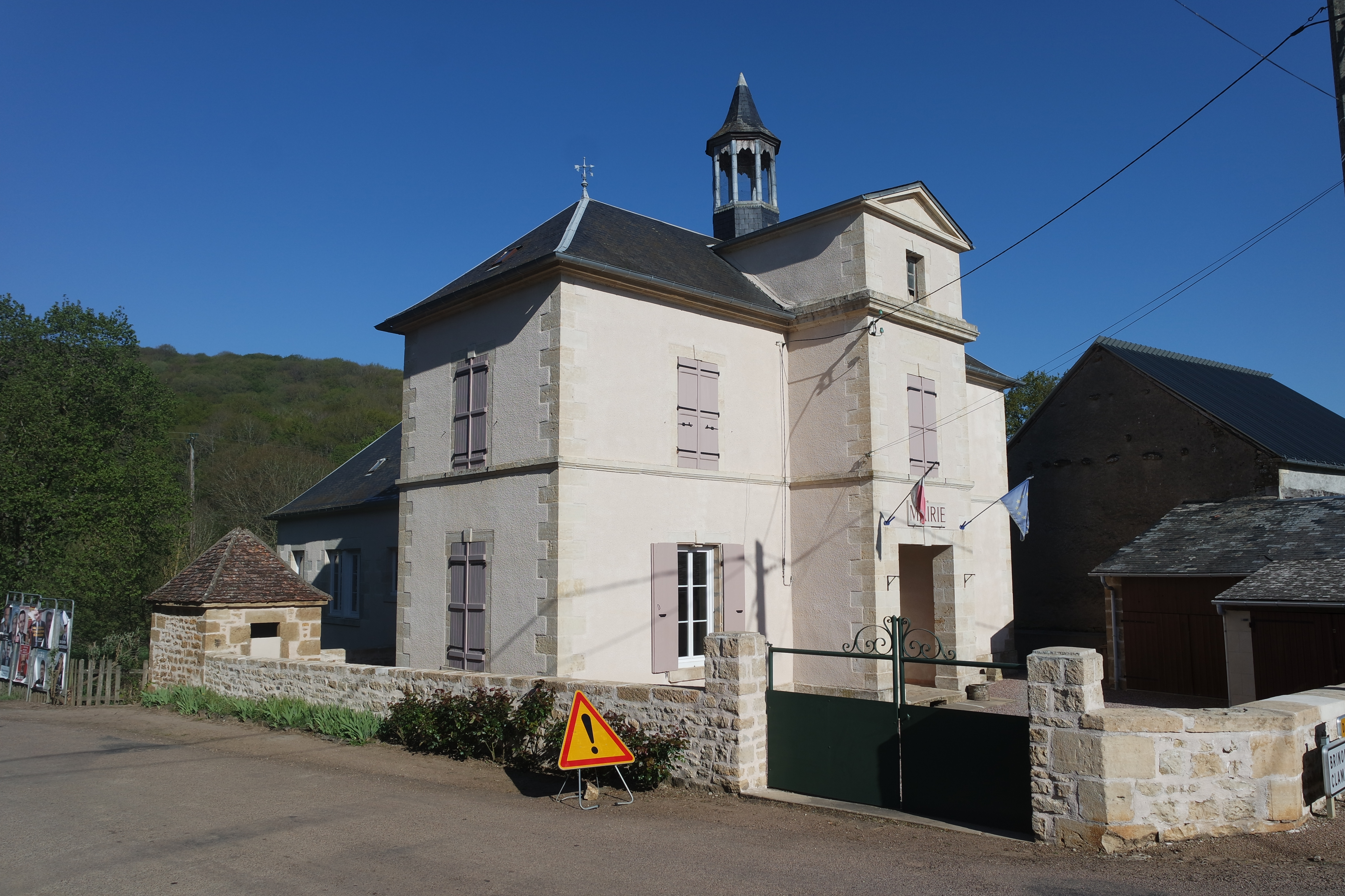 La mairie de Neuilly. 7, route du tacot. Département de la Nièvre. France.